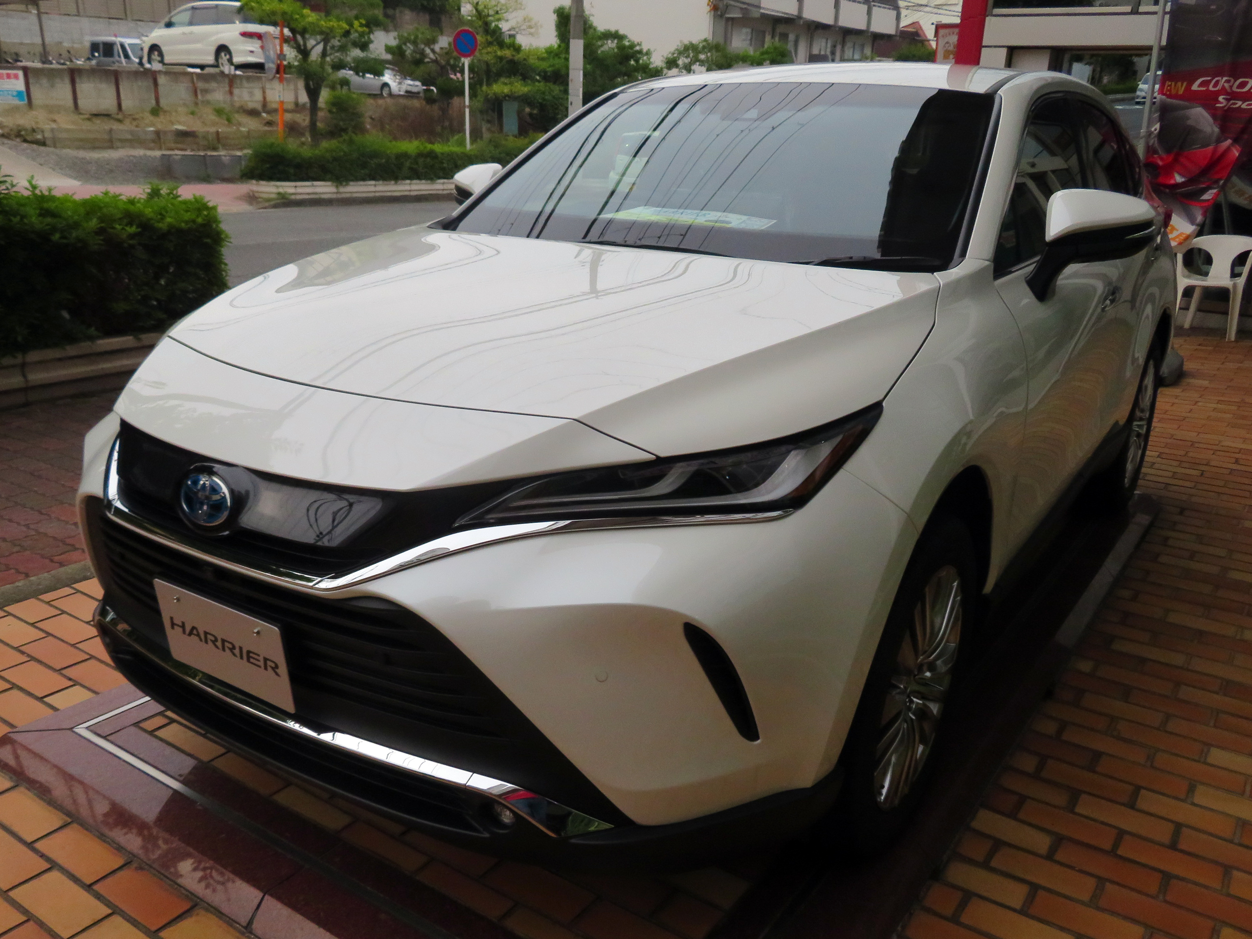 6AA-AXUH80-ANXSB(S)型トヨタ・ハリアーHYBRID Z"Leather Package"2WDをフロントから撮影。